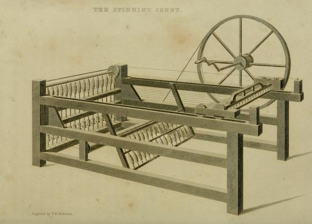 Die Spinnmaschine "Spinning Jenny" von James Hargreaves. Hargreaves patentierte seine Jenny 1770 in Nottingham und Arkwright ließ seine Jenny 1769 an gleicher Stelle patentieren